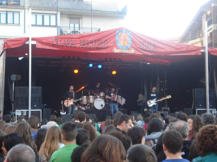 Gozategi taldeak Etxarri Aranatzen 2014. urtean eskainitako kontzertua.